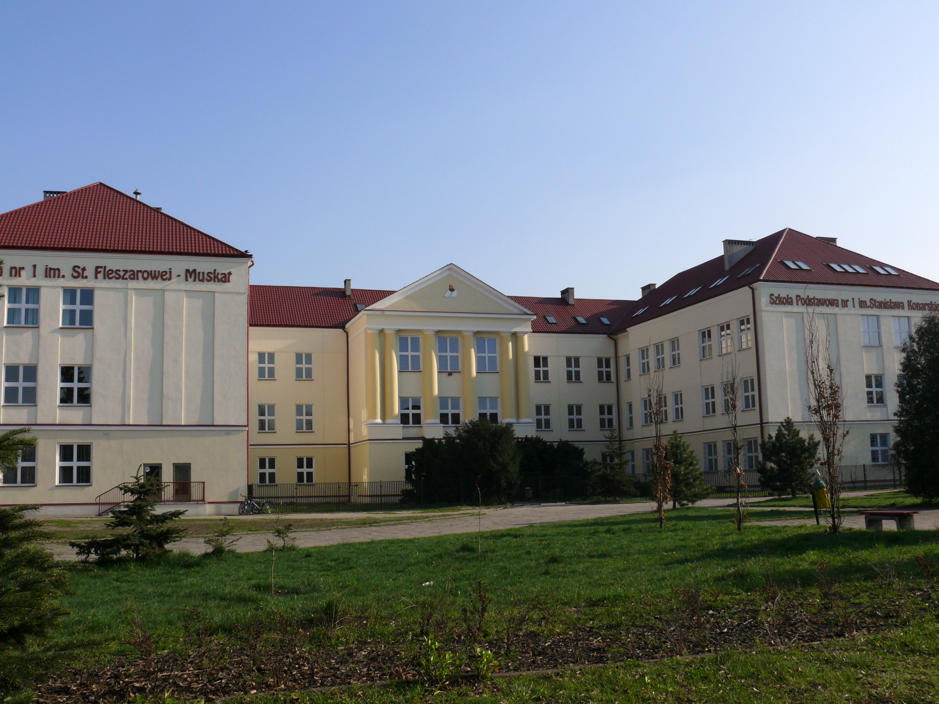 Szkoła Podstawowa nr 1 i Gimnazjum nr 1 w Kole